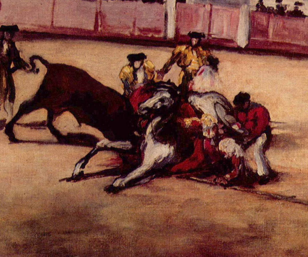 Detail du tableau de Manet Combat de taureau (1865-1866)